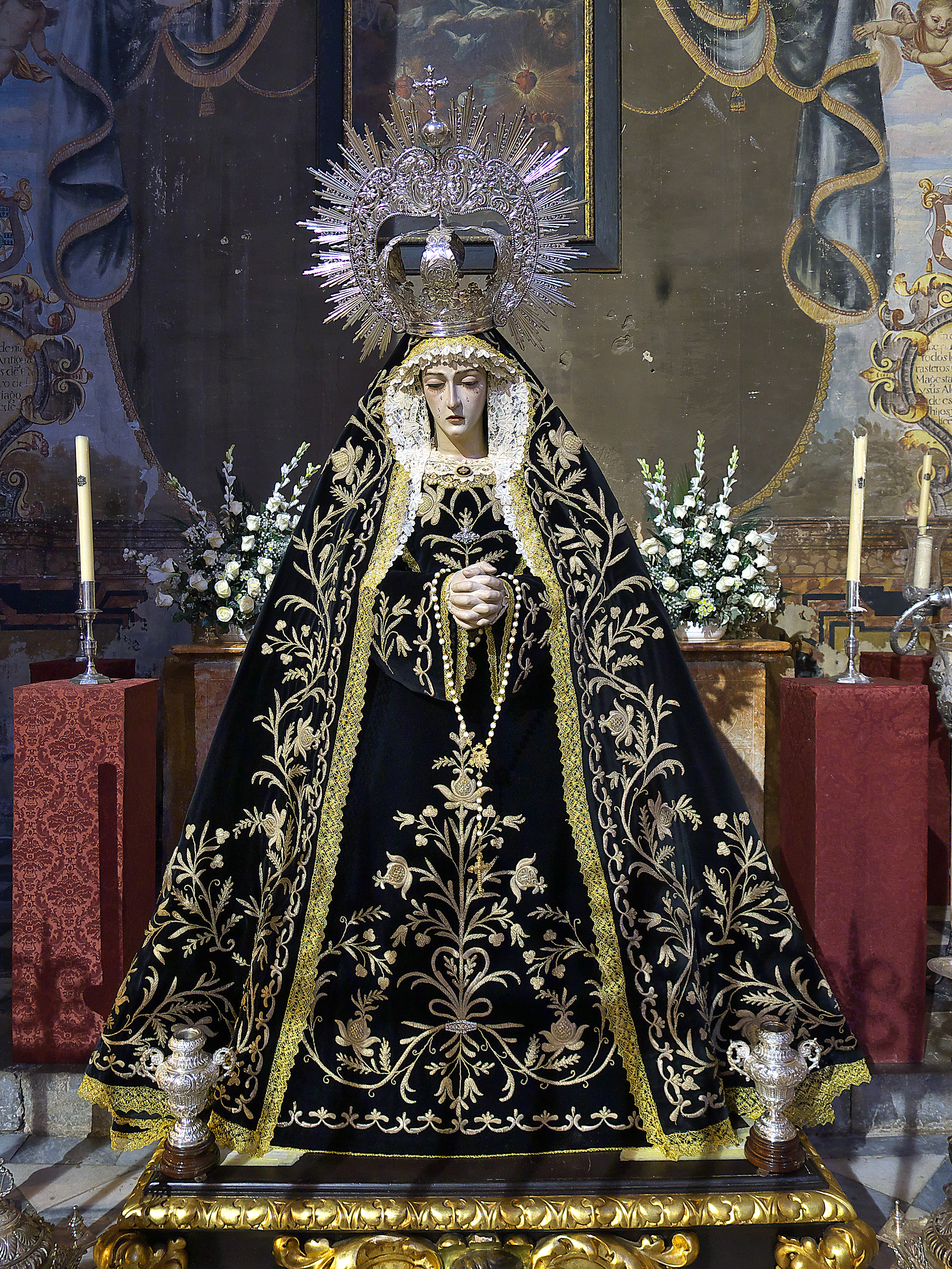 Monasterio de San Jerónimo, Granada. Titular de la Pontificia y Real Hermandad de Nuestra Señora de la Soledad y Descendimiento del Señor, Granada. Imagen atribuída a Pedro de Mena.